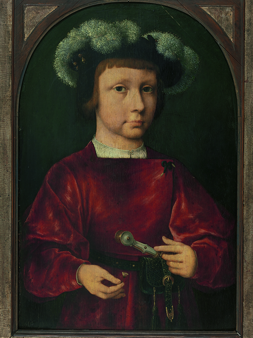 Joos van Cleve, Portret van een jonge edelman, 1525-1535, olieverf op paneel, 56 x 38,3 cm.